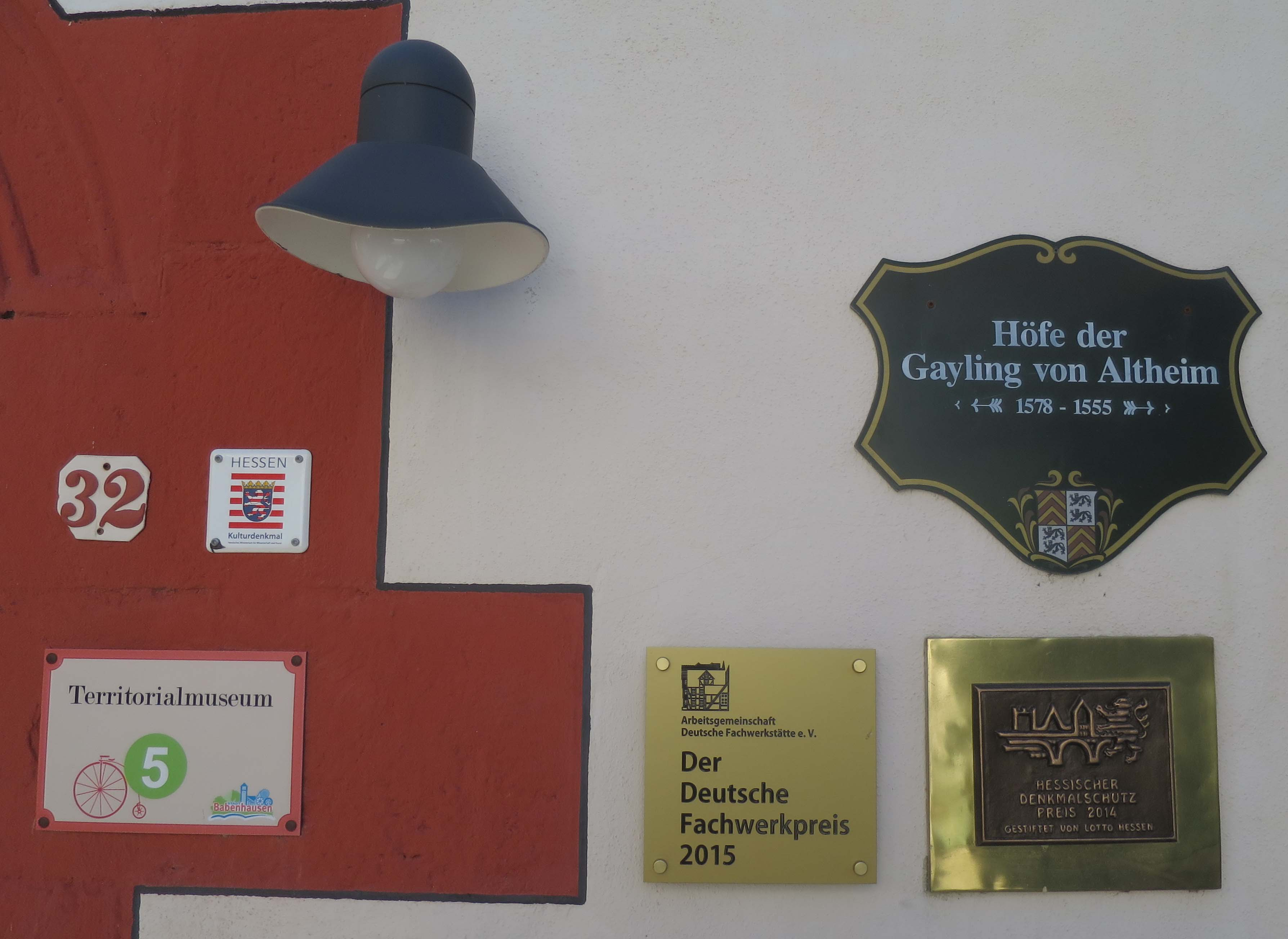 Info-Schilder-Häufung am Territorialmuseum Babenhausen (Hessen)